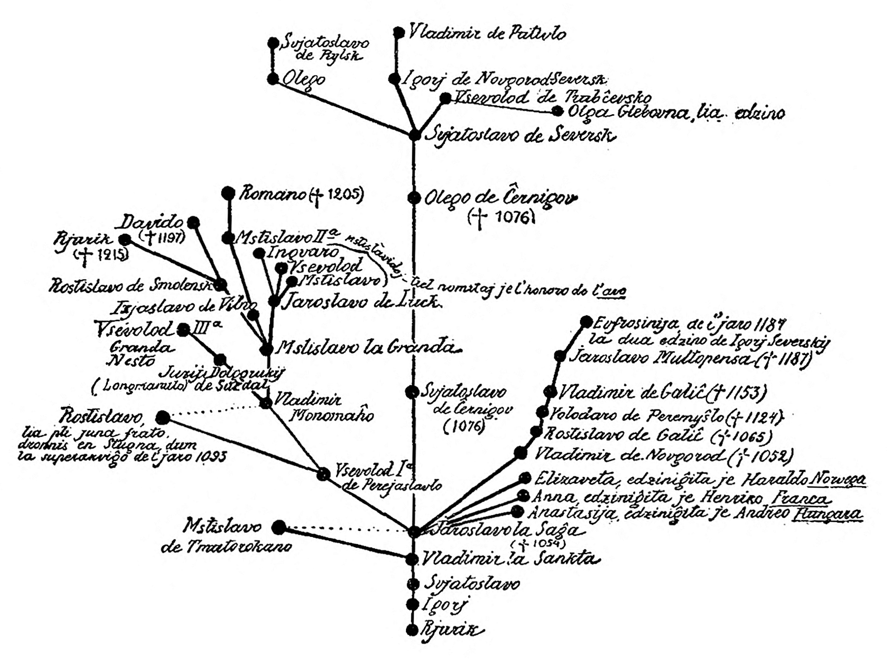 Poemo pri la militiro de Igorj - genealogia nomaro de l’ princoj